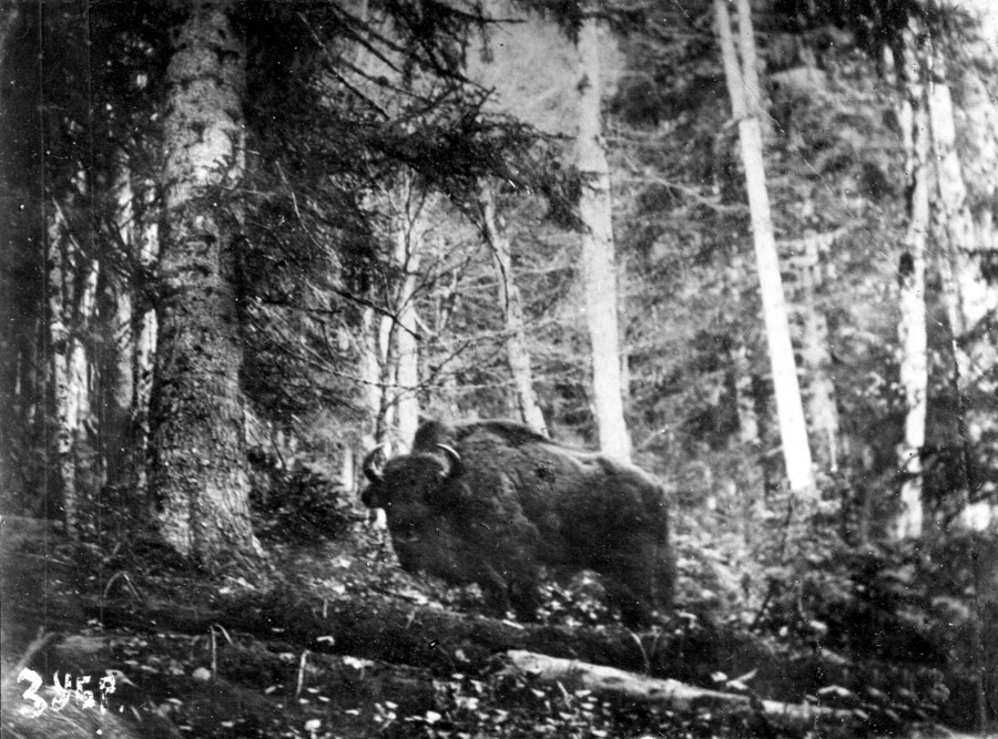 Единственная прижизненная фотография кавказского зубра. Фото Э. К. Ютнера, конец XIX в. (фотоархив С.А. Трепета)